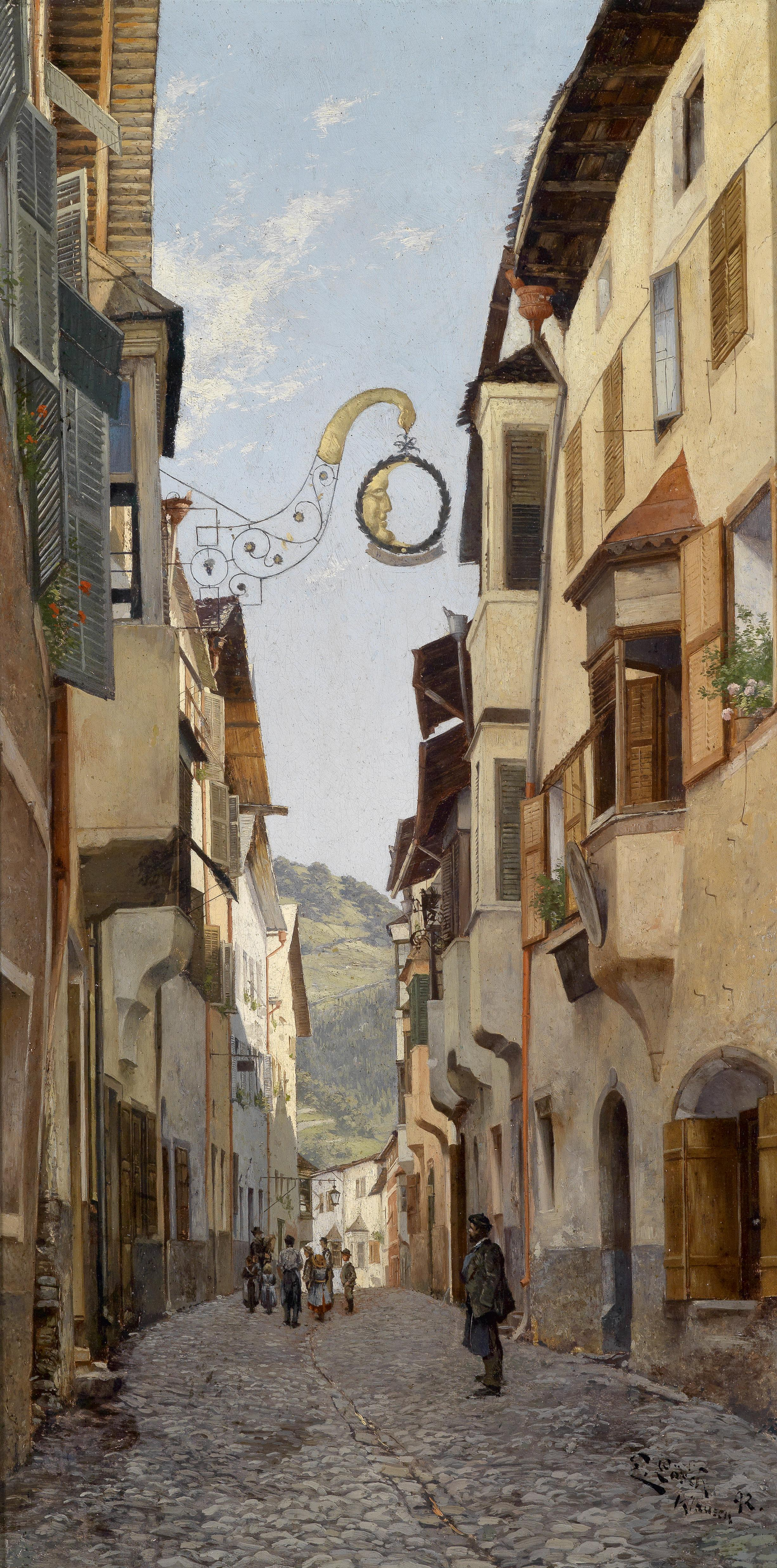 Kleine Gasse in Klausen, signiert, datiert, bezeichnet E. Lösch Klausen (18)92, Öl auf Leinwand, 70 x 36 cm